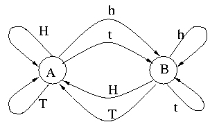 شکل 3: مدل مخفي مارکوف براي پرتاب سکه طبق راول فوق